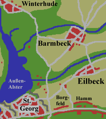 Barmbek um 1800